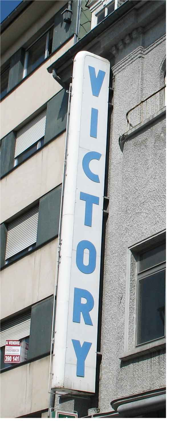 Liichtreklamm vum Victory am Joer 2005.